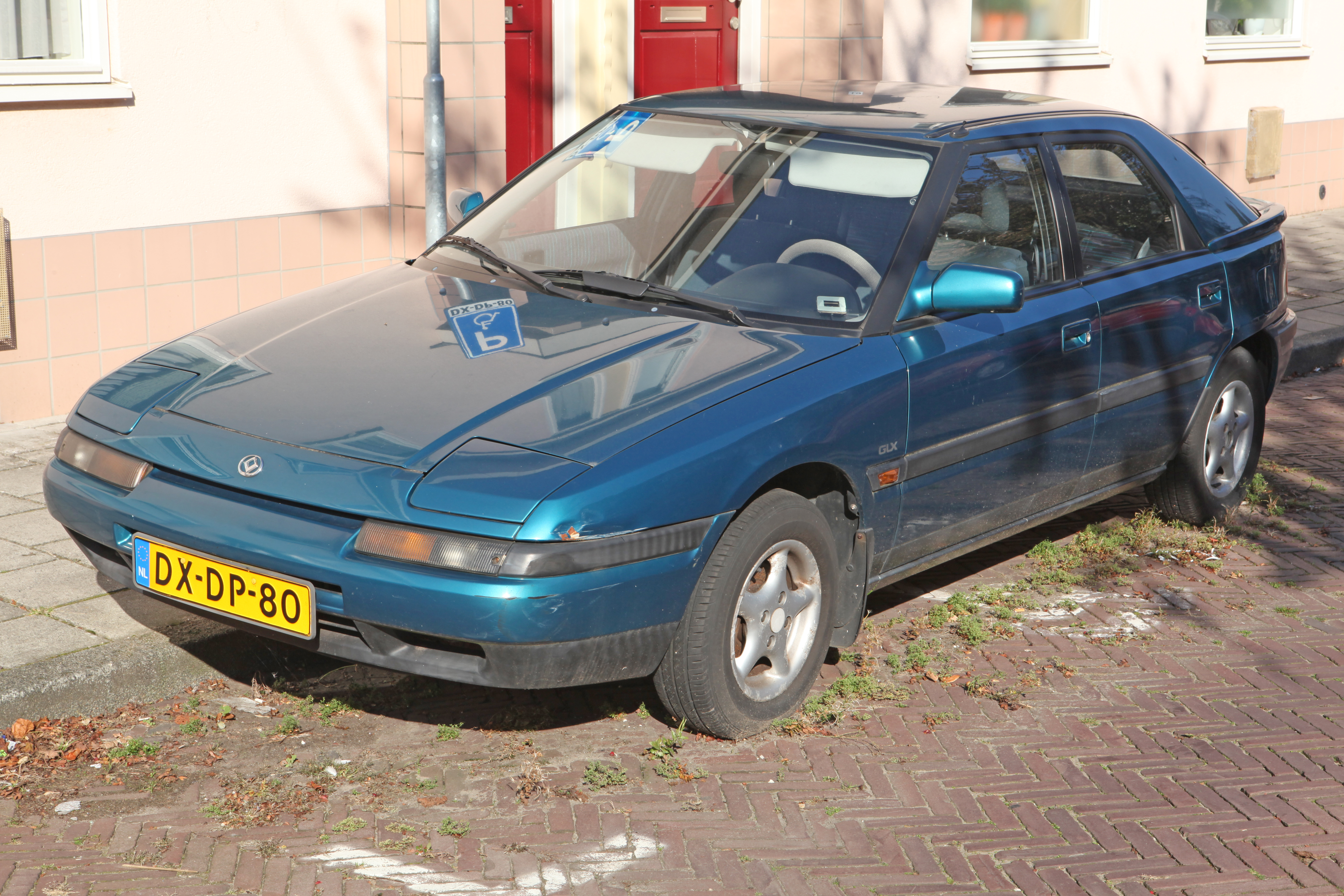 1992 Mazda 323 F 1.6I-16V GLX